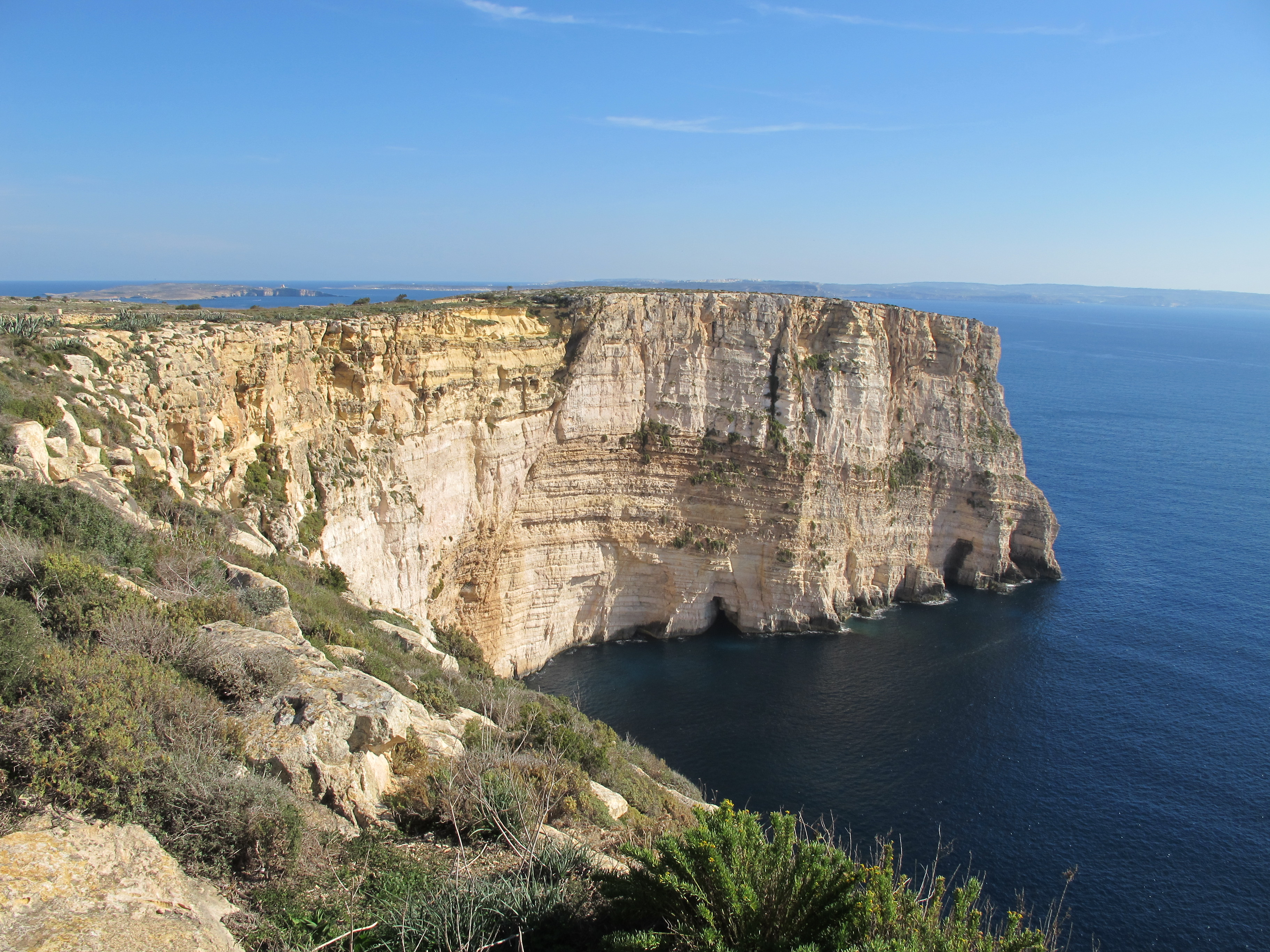 Klippen von Ta' Cenc, Gozo